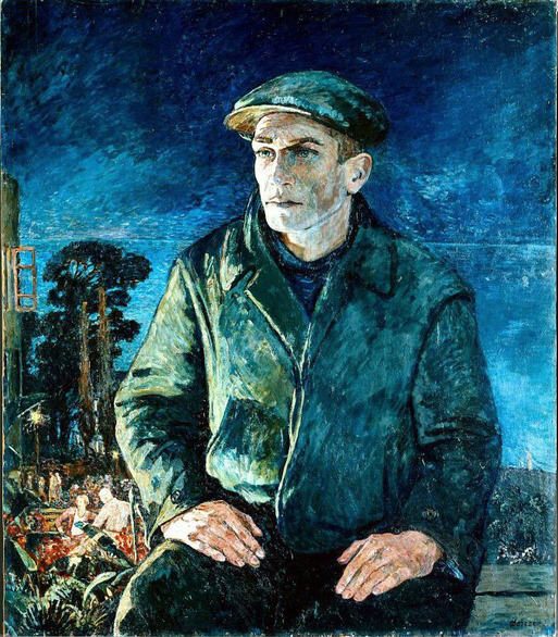 Deutscher Stachanowarbeiter im Erholungsheim Sotschi (Mitglied der Stachanowbewegung); Moskau 1936; Berlin, Staatliche Museen zu Berlin - Preußischer Kulturbesitz, Nationalgalerie, Inv.-Nr. A III 279 Neue Nationalgalerie Native nameNeue NationalgalerieParent institutionBerlin State MuseumsLocationBerlinCoordinates52° 30′ 25.17″ N, 13° 22′ 02.71″ E Established1968Web page control : Q32659772 VIAF: 142711389 ISNI: 0000 0001 1945 5804 LCCN: n92076661 GND: 5298136-8 WorldCat institution QS:P195,Q32659772